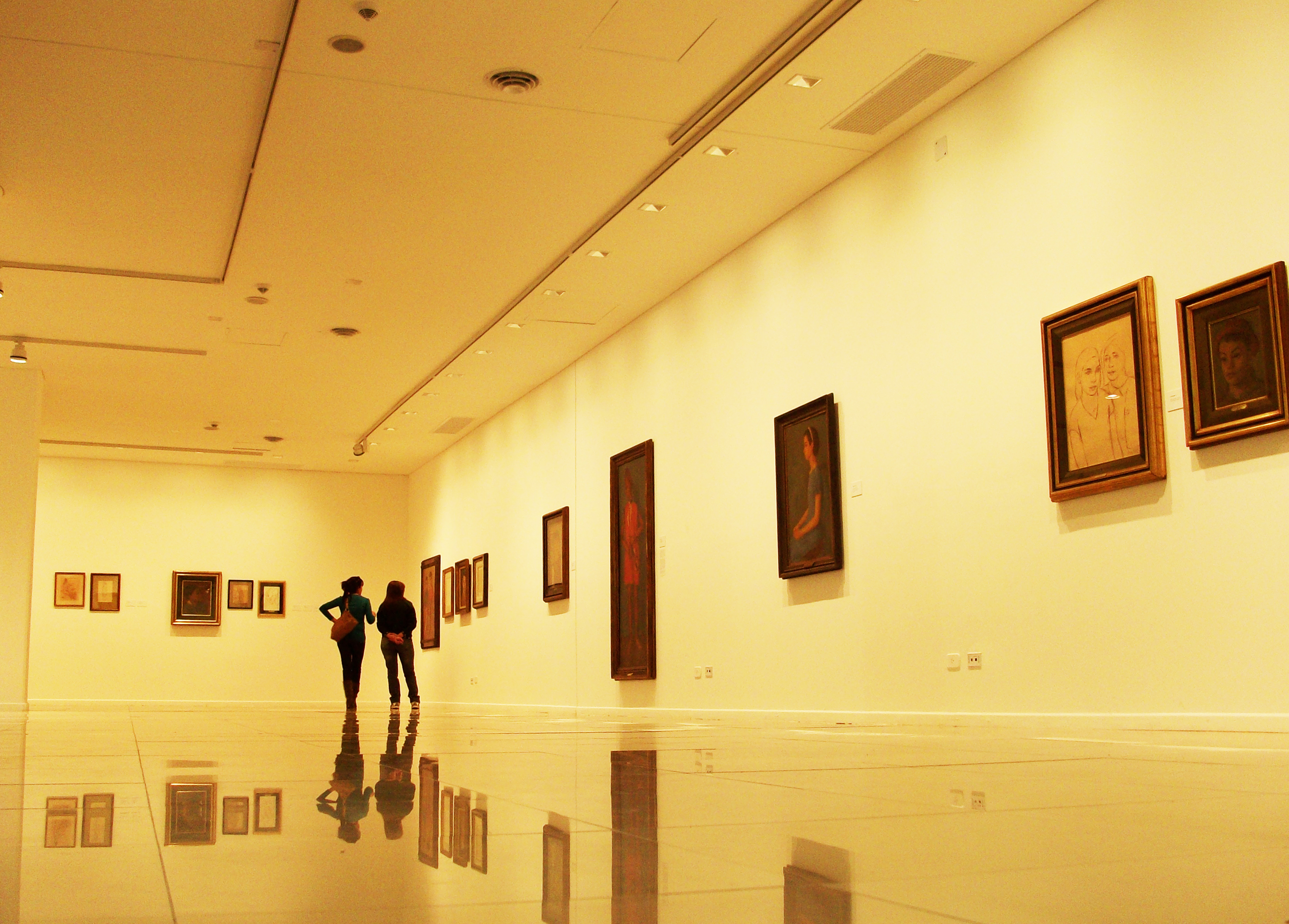 El Museo de Bellas Artes de Santiago del Estero, ubicado en el Centro Cultural del Bicentenario de dicha ciudad.